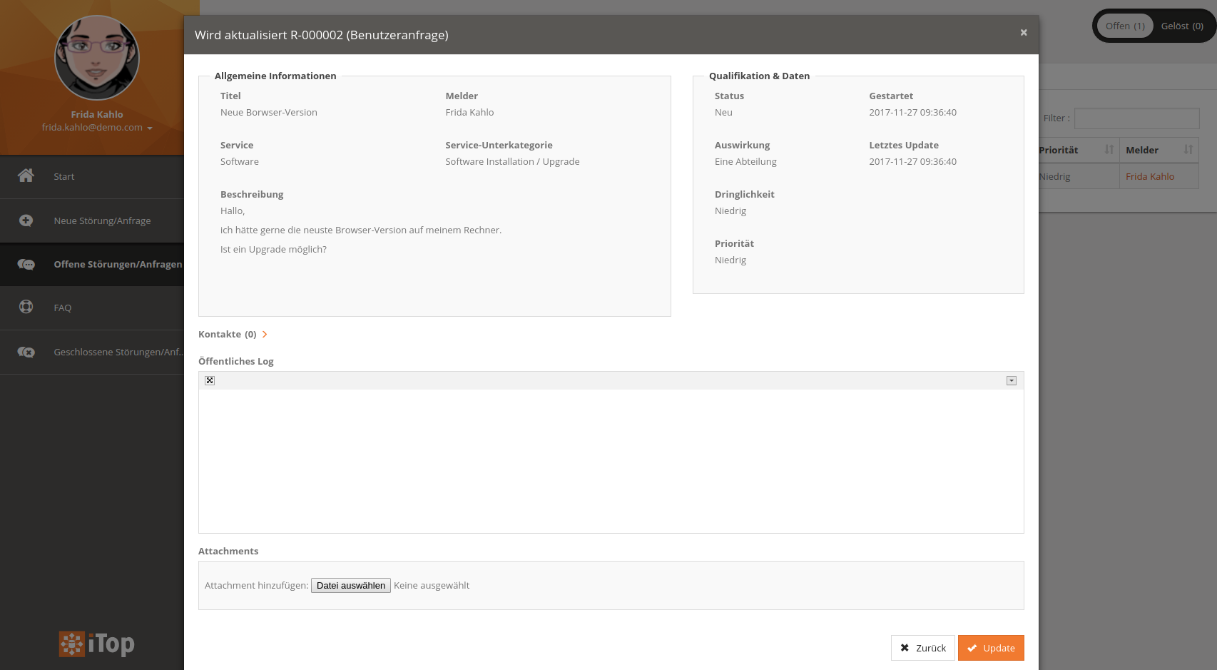 Ticket Ansicht im Endbenutzerportal von iTop 2.4.0